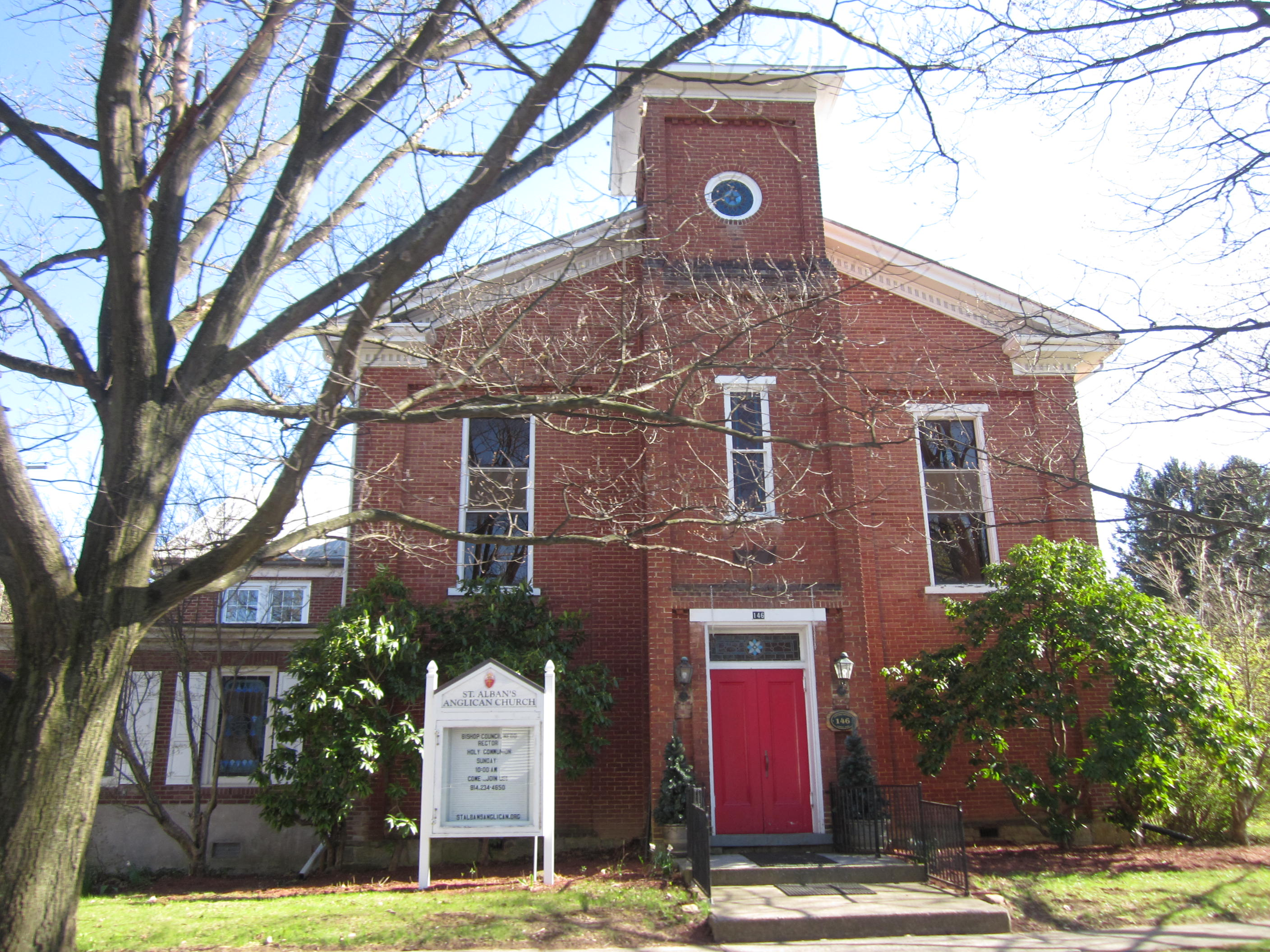 Pine Grove Mills, Pennsylvania